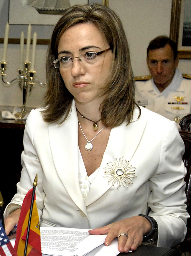 Carme Chacón, ministra de Defensa de España